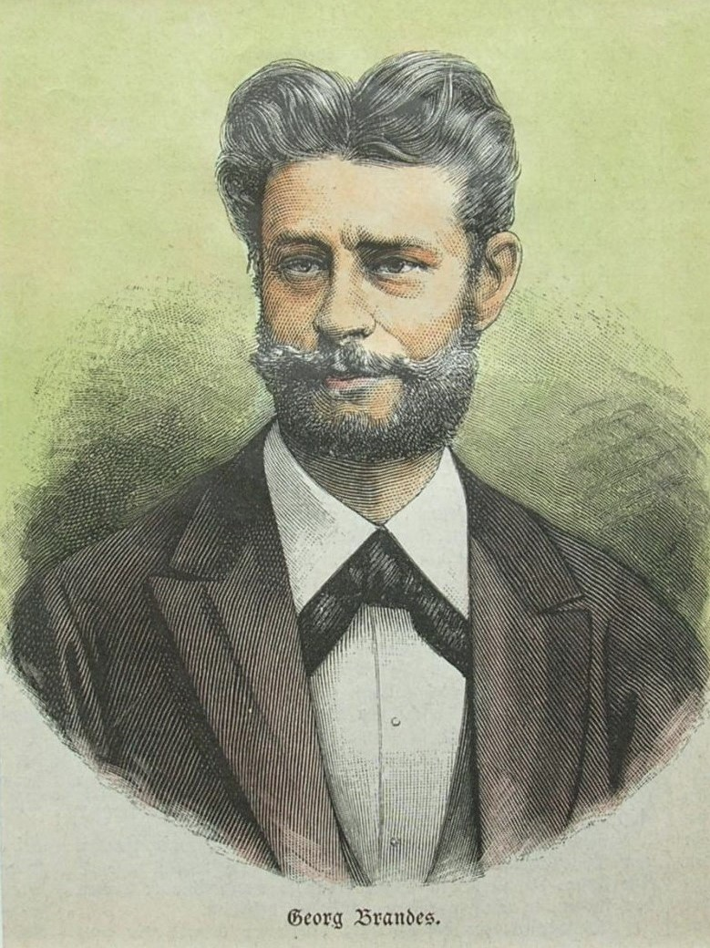 Georg Brandes, 1885, teilkolorierter Holzstich, ca. 12 x 10 cm